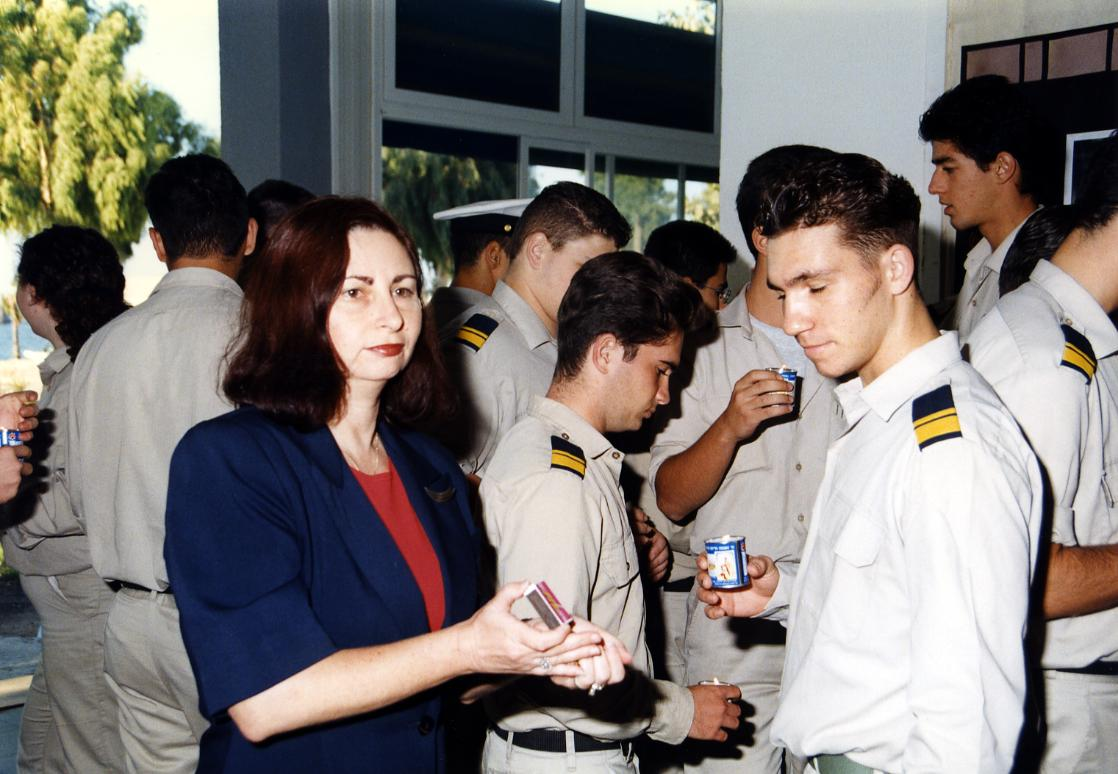 סגנית מנהלת ההוראה אסתר רייכלסון באזכרה ליצחק רבין 1996